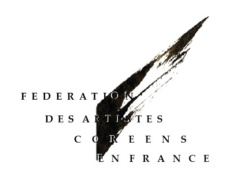 재불예술인총연합회 로고